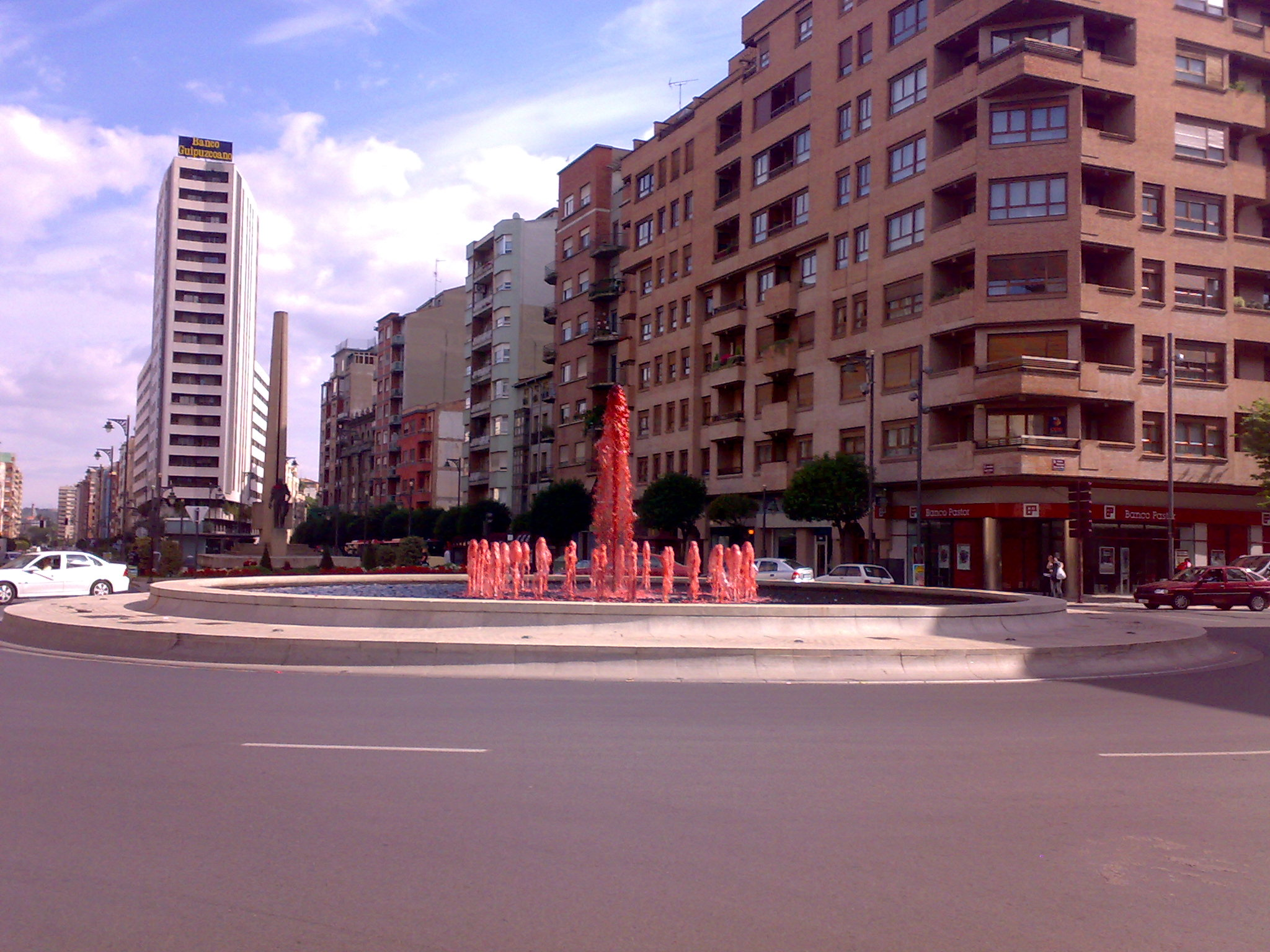 La "Fuente de vino", tradición en las Fiestas de San Mateo desde 2007.